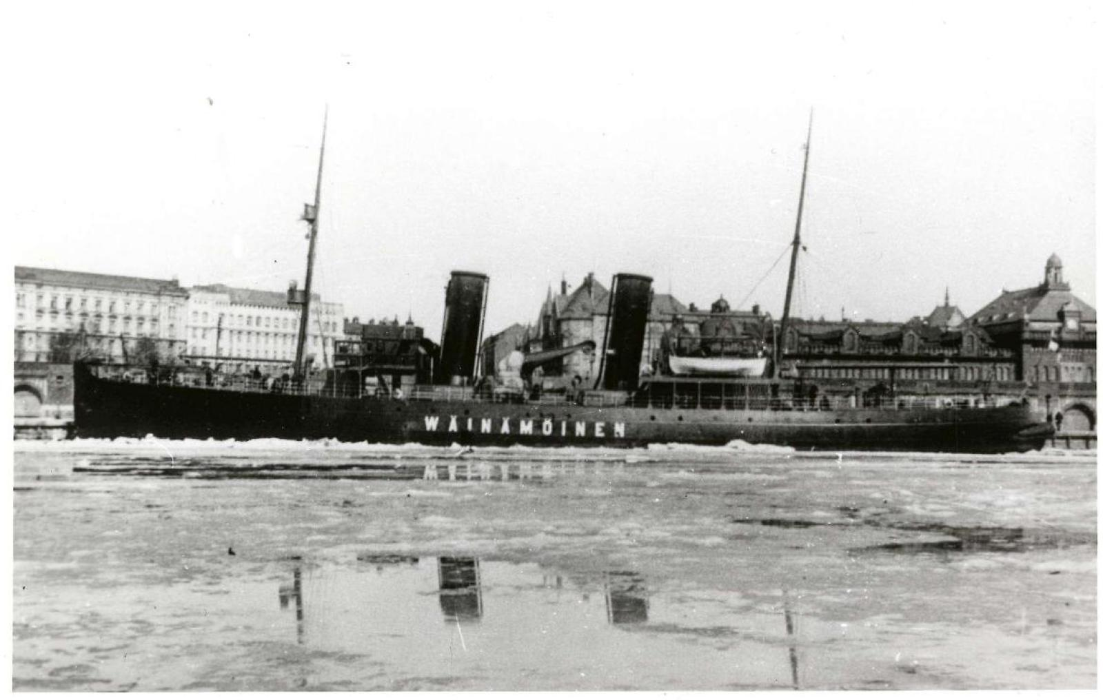 Jäänmurtaja Wäinämöinen Katajanokan rannassa.